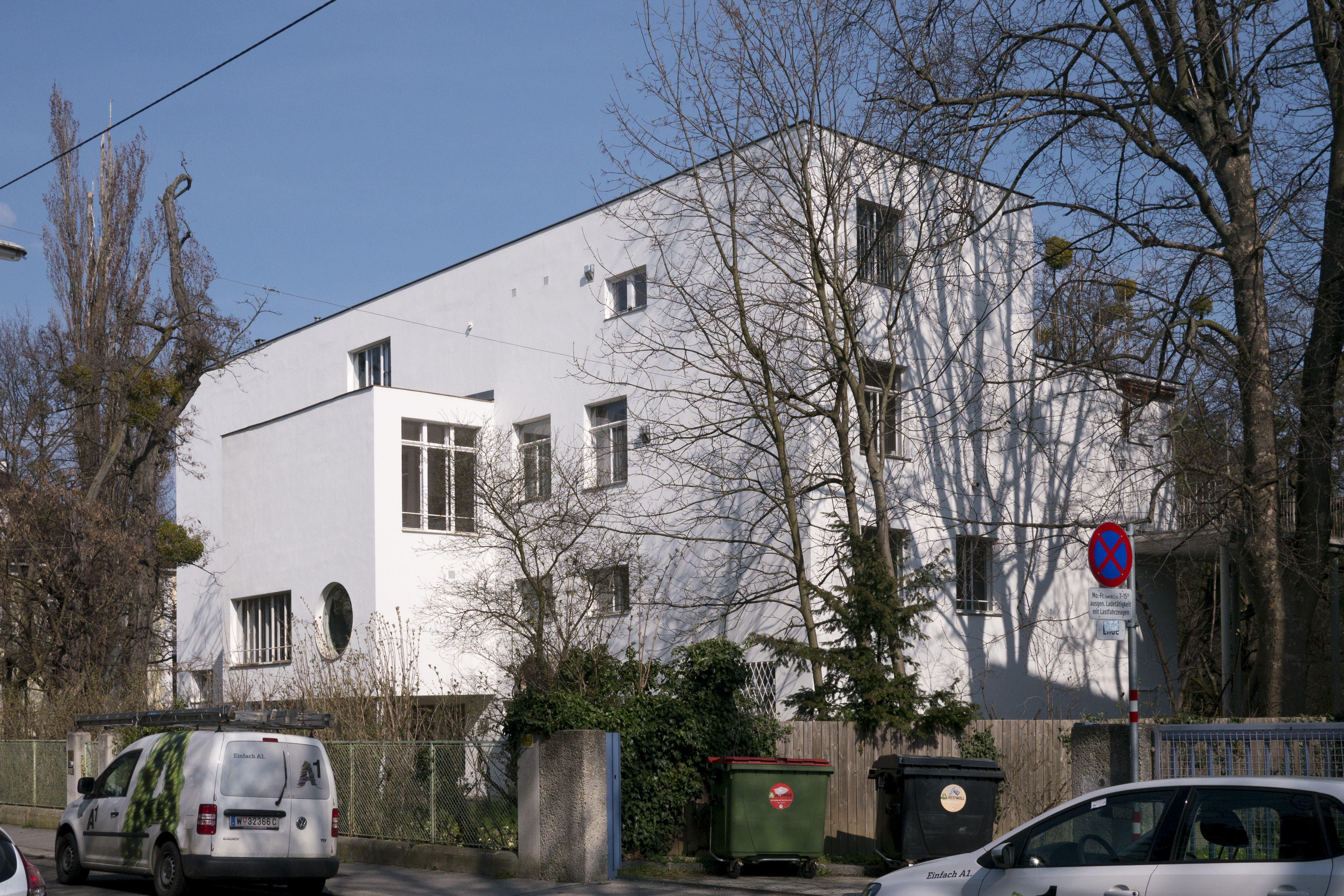 Villa / Landhaus, Haus Beer